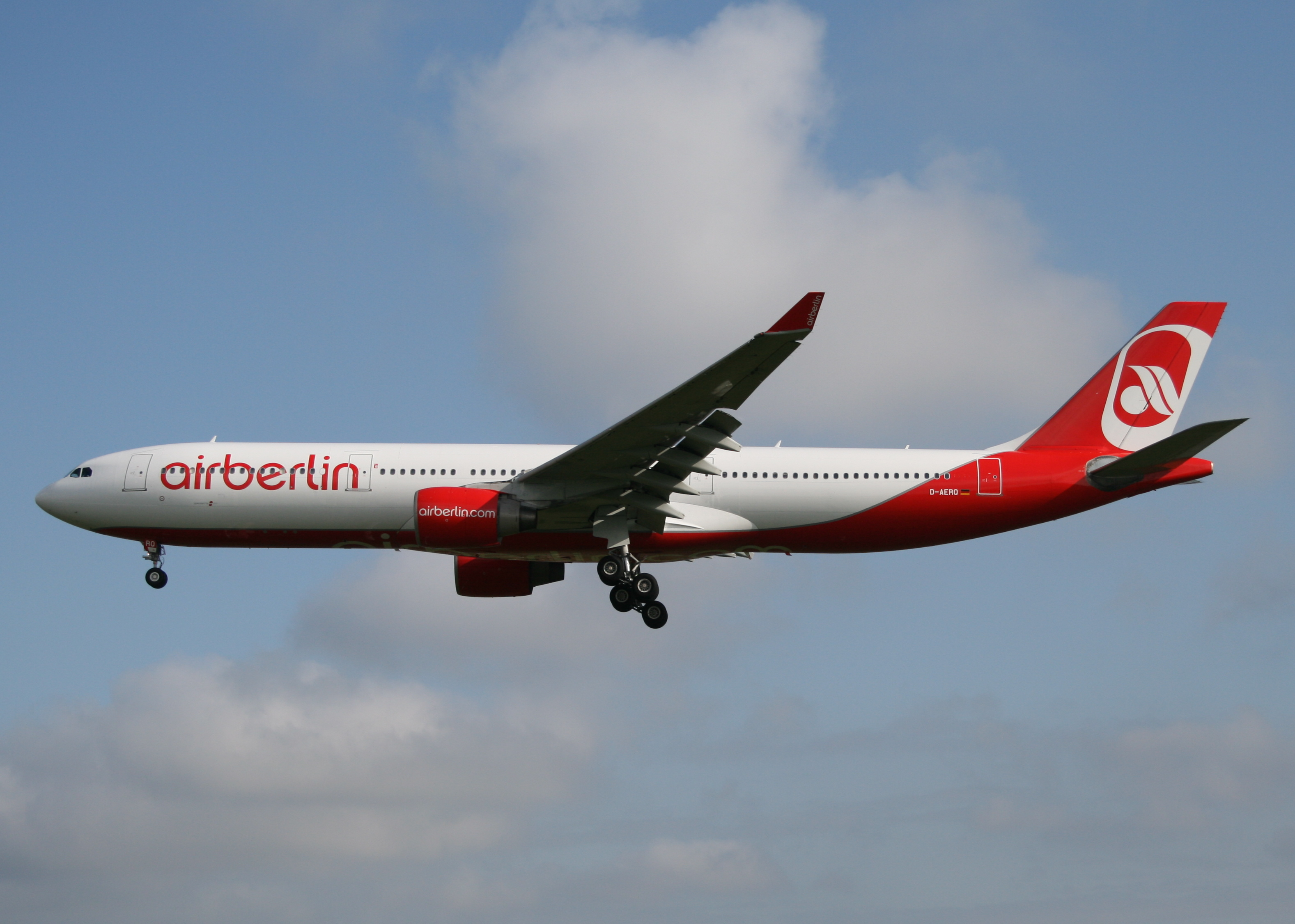 Haj/Eddv 16-04-08 d-aerq